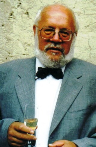 Foto von Benutzer:Reimmichl-212